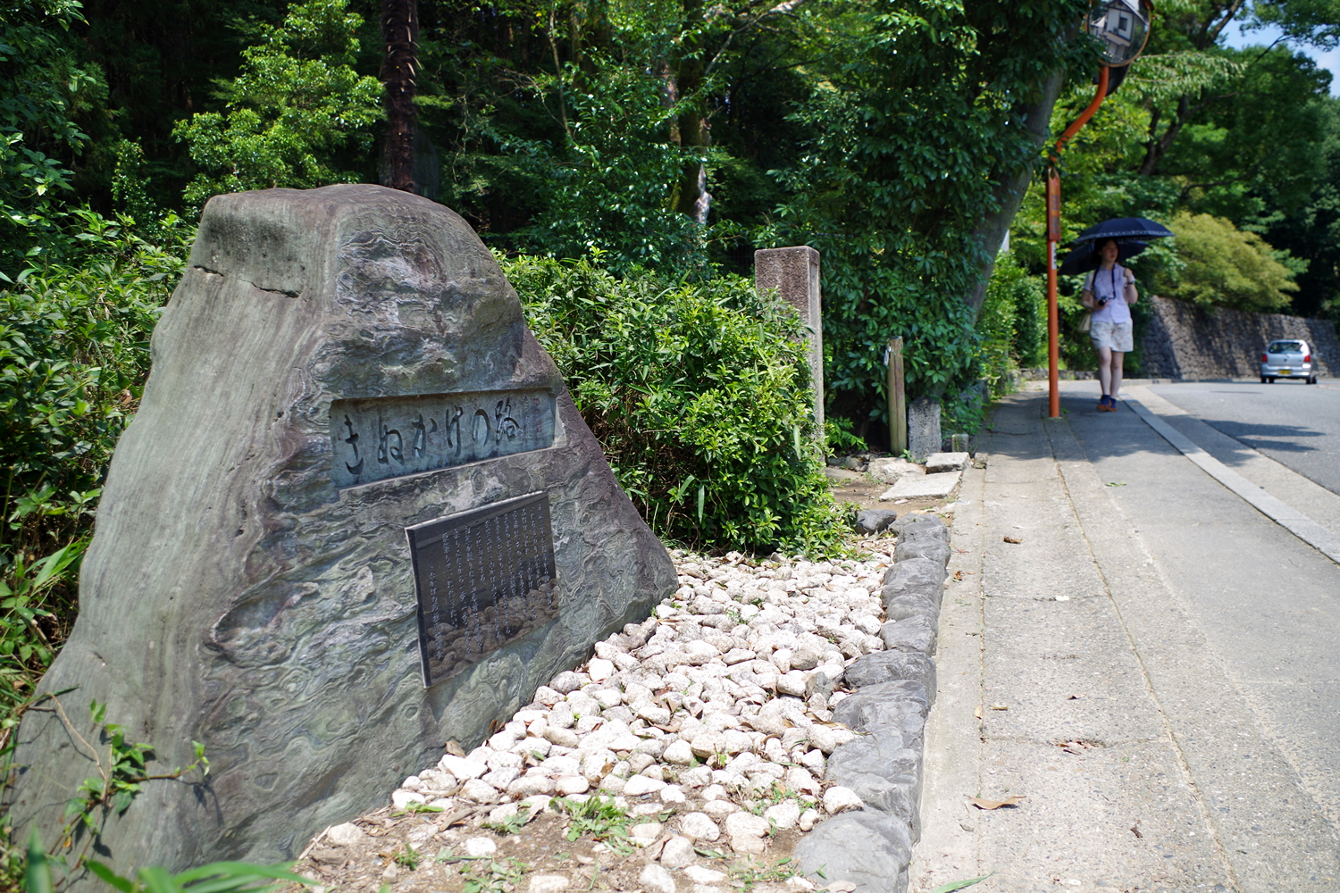 京都市北西部の観光道路「きぬかけの路」 住吉山霊園の入口の「きぬかけの路」石碑前で撮影。